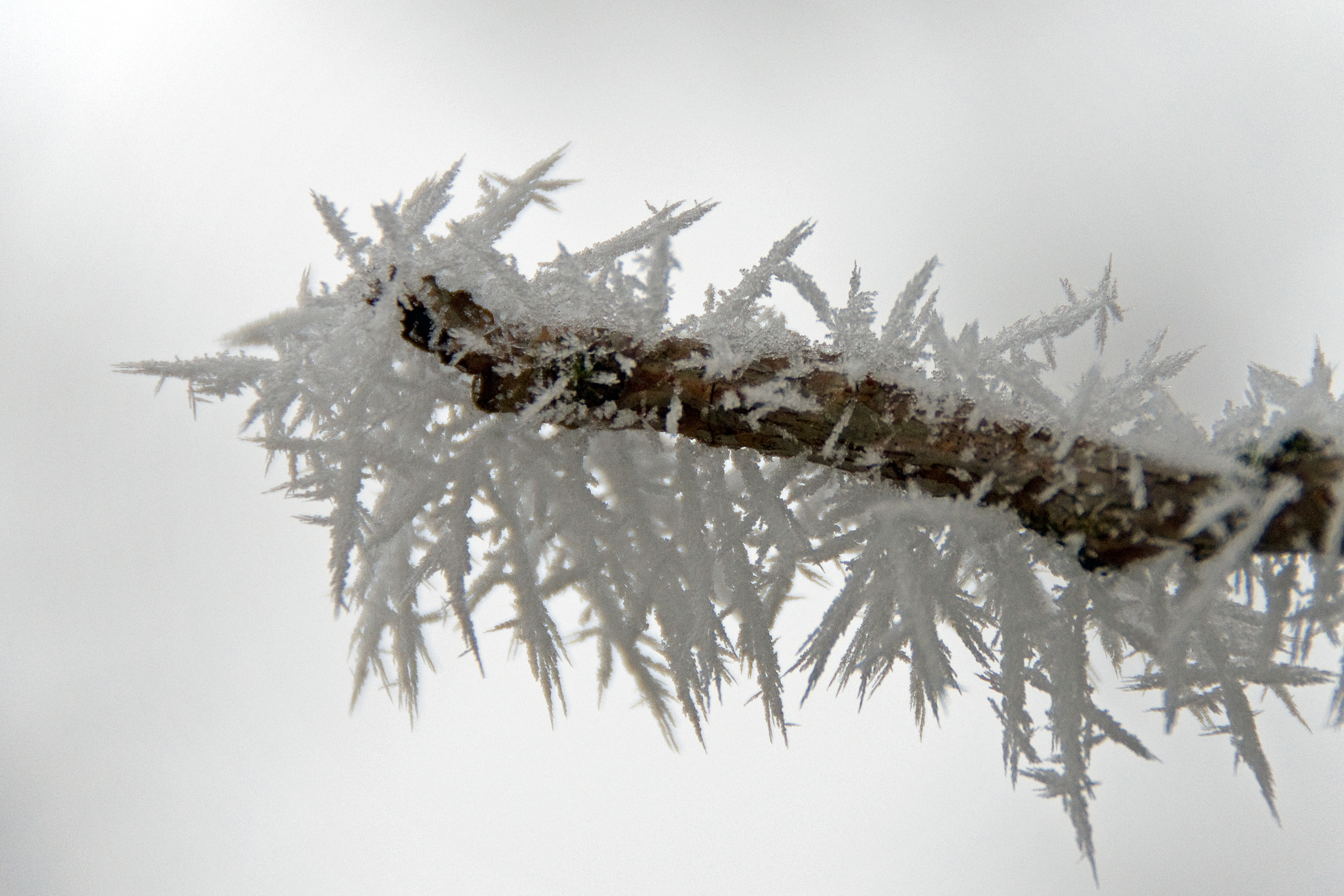 Raureif am Baum